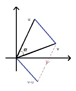 Afbeelding gebruikt bij het artikel van het inwendig product.